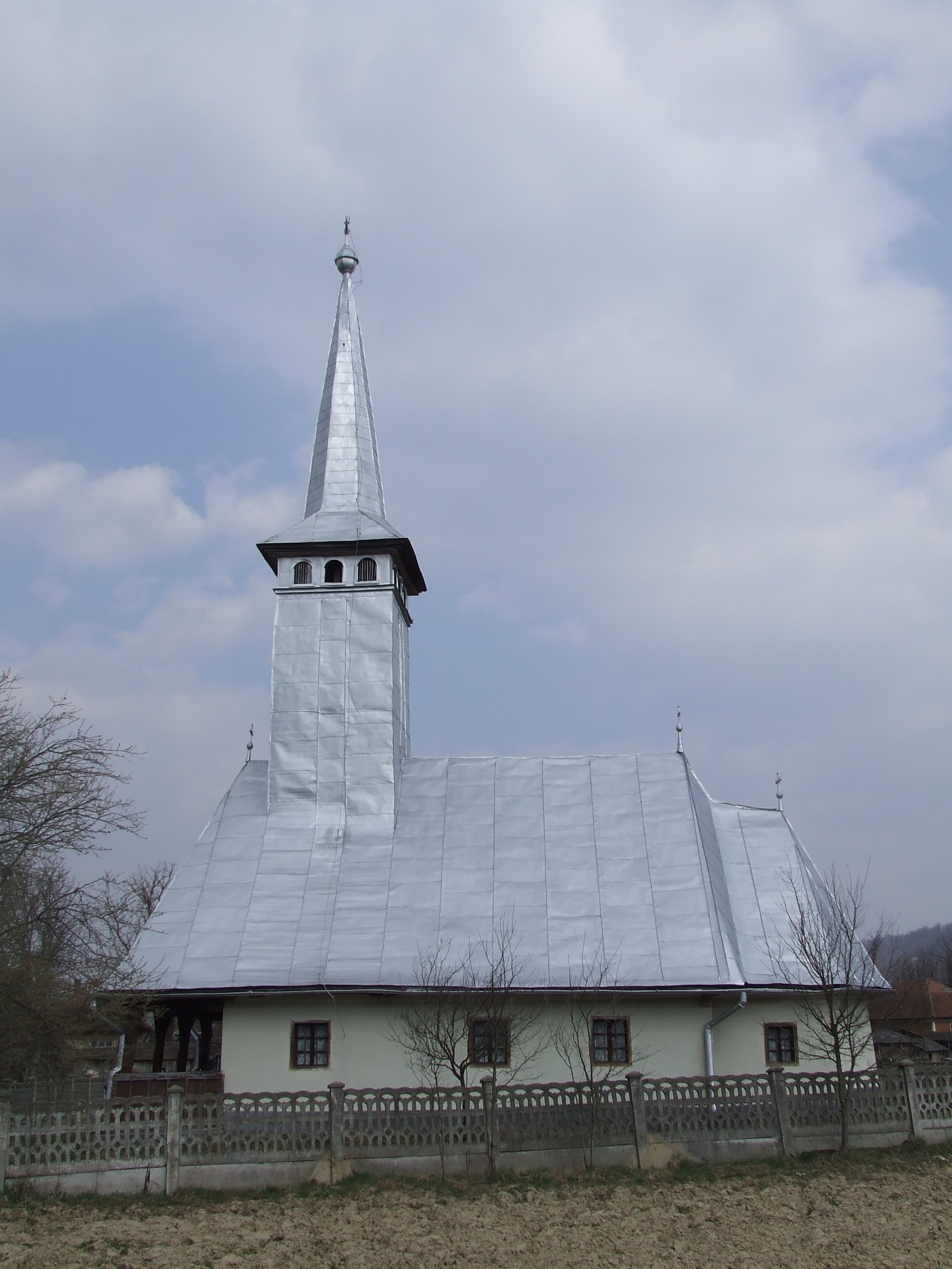 Biserica de lemn din Preluci, judeţul Sălaj. DC30 road Autor: Bogdan Ilieş Data: martie 2007